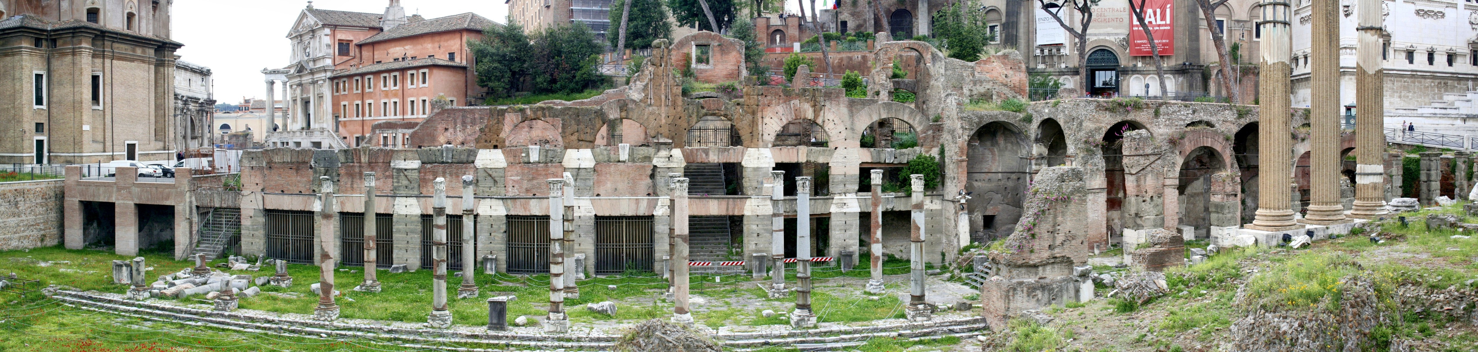 Panorama du Forum de César.